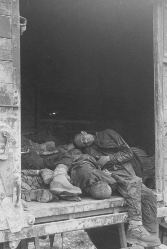 Foto 57810: Corpses in a death train in Dachau